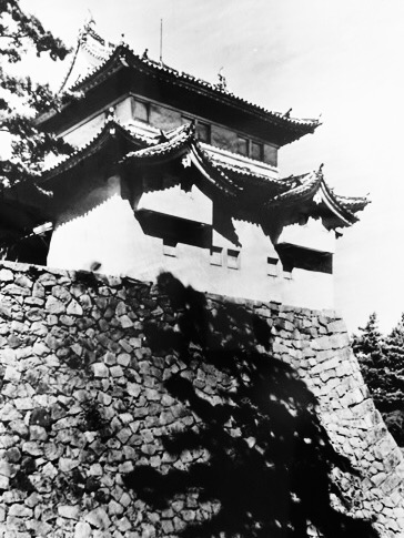 名古屋城 本丸 東北隅櫓（焼失）